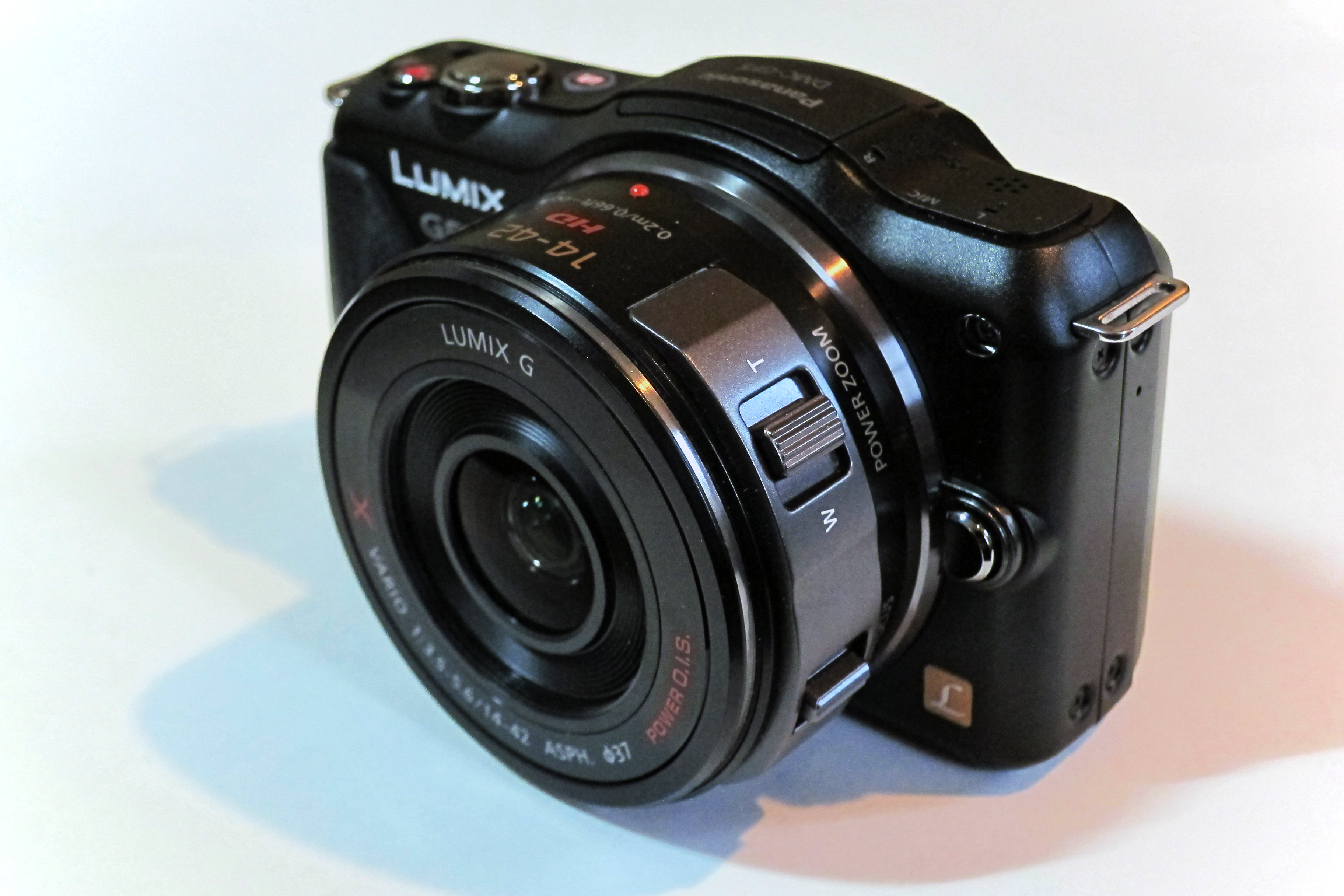 Panasonic Lumix DMC-GF5